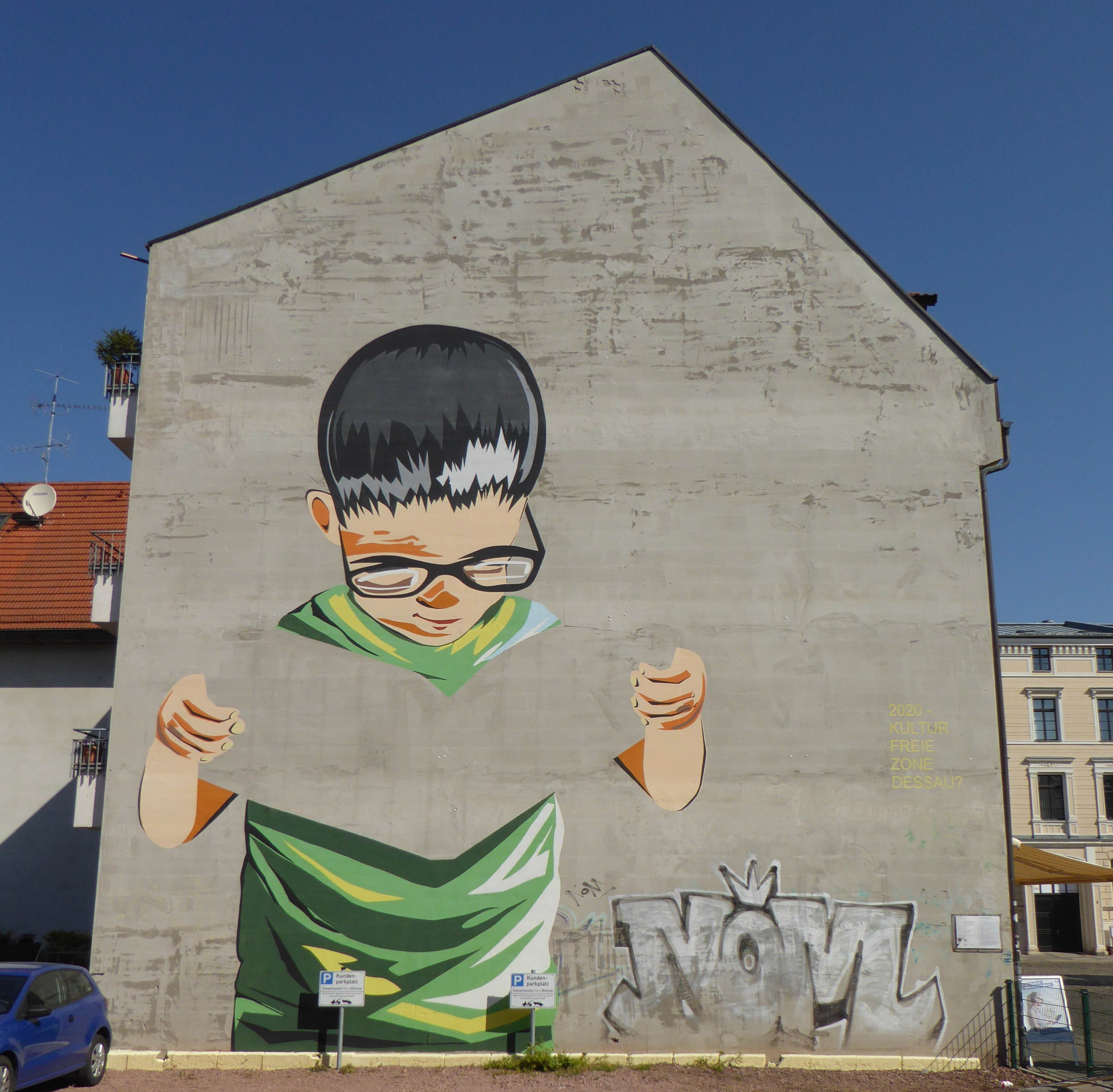 DER_KEIN_BUCH_LESENDE (weitere Bezeichnungen: "DER NICHT-BUCH LESENDE", "Der kein Buch Lesende", "Der Kein-Buch Lesende", "Der nicht Buch lesende Junge") Diese Arbeit von Frau Arlett Streich sowie der dazugehörige Film ( von Herrn Oliver Reichelt entstanden innerhalb des Studiums an der Fachhochschule Anhalt (Fachbereich Design) im Fach künstlerischen Grundlagen (Prof. Lisa M. Stybor) im 1./2. Semester. Gesamtleitung: Prof. Lisa M. Stybor, Bildnerisches Gestalten, department of design, Hochschule Anhalt in Dessau (FH) Video auf - auf "MIT WANDBILD GEGEN KULTURFREIE ZONE; Designer gestalten Giebelwand in der Johannisstrasse; Das neue Wandbild in der Johannisstrasse soll zur Diskussion und zum Nachdenken anregen..." Artikel zum Wandbild (am 8. Mai 2011), Mitteldeutsche Zeitung von Thomas Steinberg Sekundärquelle: Rede von Lisa M. Stybor auf der Eröffnungsfeier am 7. Mai 2011 vor dem Wandbild, Johannisstrasse 1 in Dessau-Rosslau: und Gesamtpräsentation: bis (Hinweis: der Pfeil zum Weiterblättern befindet sich jeweils am rechten bzw. linken Rand der Abbildungen (bei Seiten ohne Abbildung rechts oder link unterhalb der Überschrift))